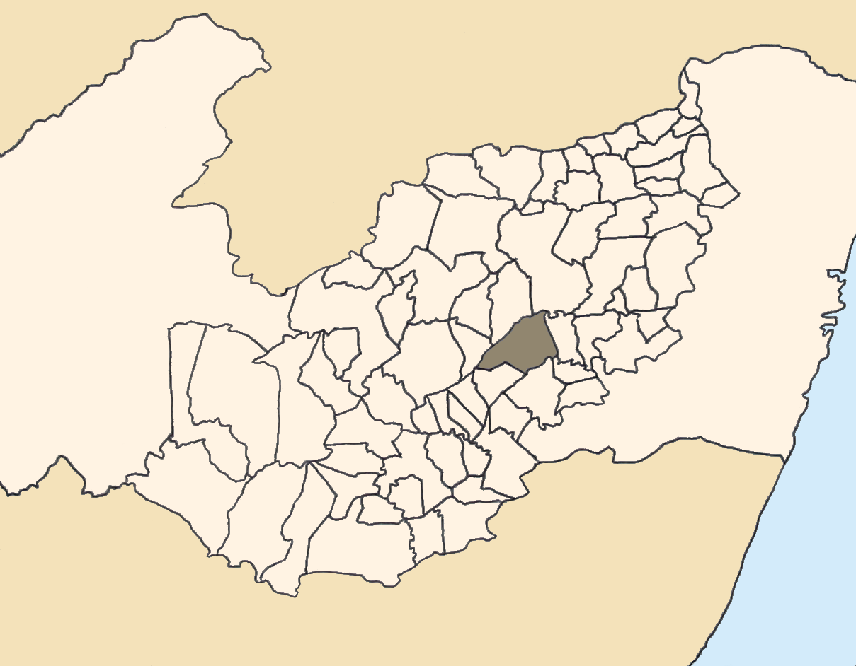 Mapa da mesorregião Agreste de Pernambuco (Brasil) subdivida em municípios. Em destaque, o município de Altinho. Map of the brazilian state of Pernambuco (mesorregião Agreste) showing the city of Altinho. Imagem tratada com o GIMP. Image made with GIMP.